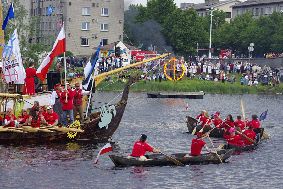 Laulupeo tuli teel.